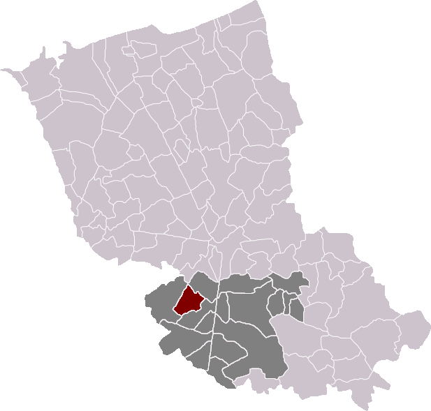 Locatie gemeente Ebblingem in arrondissement Duinkerke. Zelfgemaakt. Location of Ebblinghem municipality in the arrondissement of Dunkirk. Self made. Localisation de la commune d'Ebblinghem dans l'arrondissement de Dunkerque. Fait moi-même.